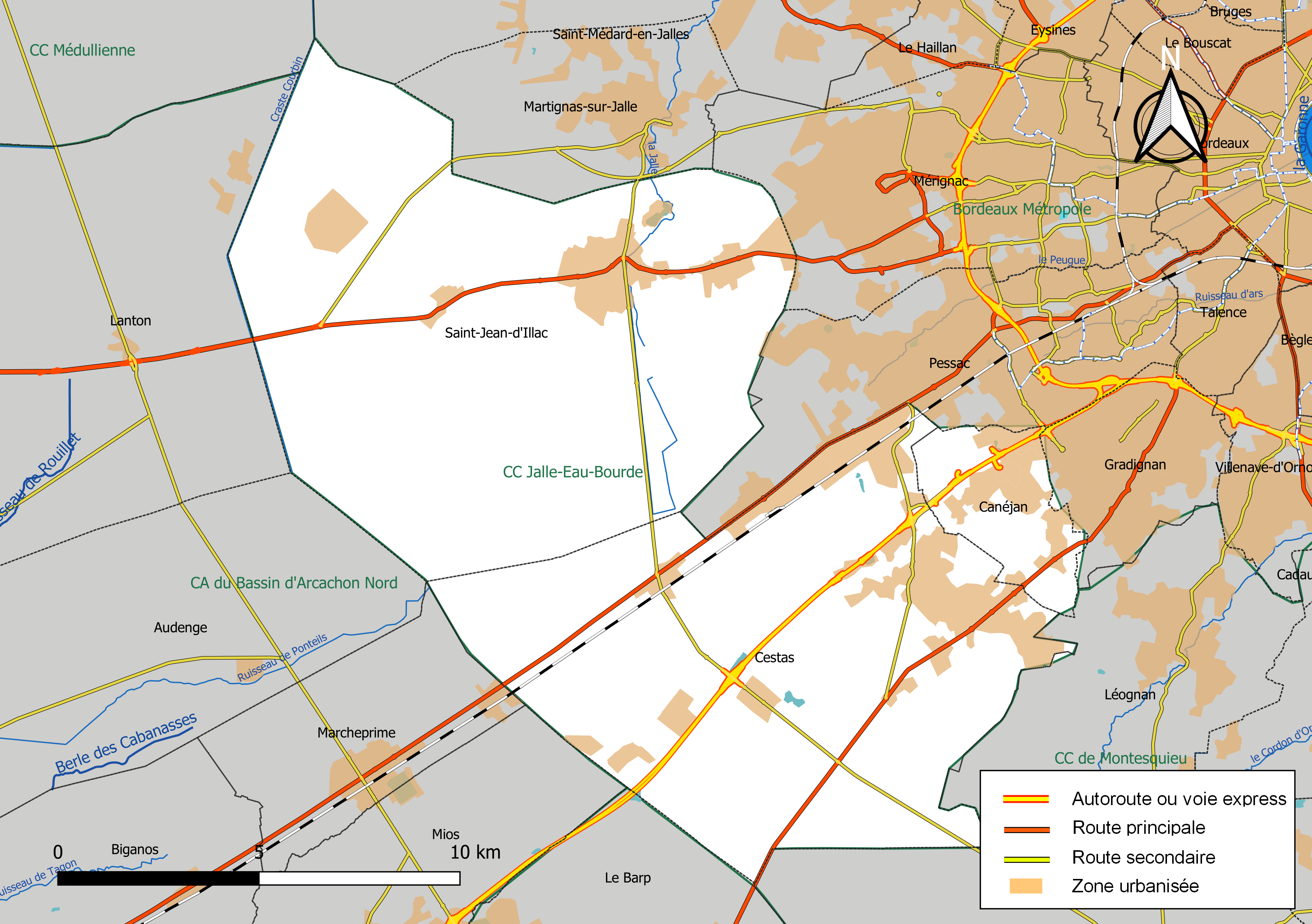 Carte géographique de la Communauté de communes Jalle-Eau-Bourde, département de la Gironde, France. Composition au 1er janvier 2019.